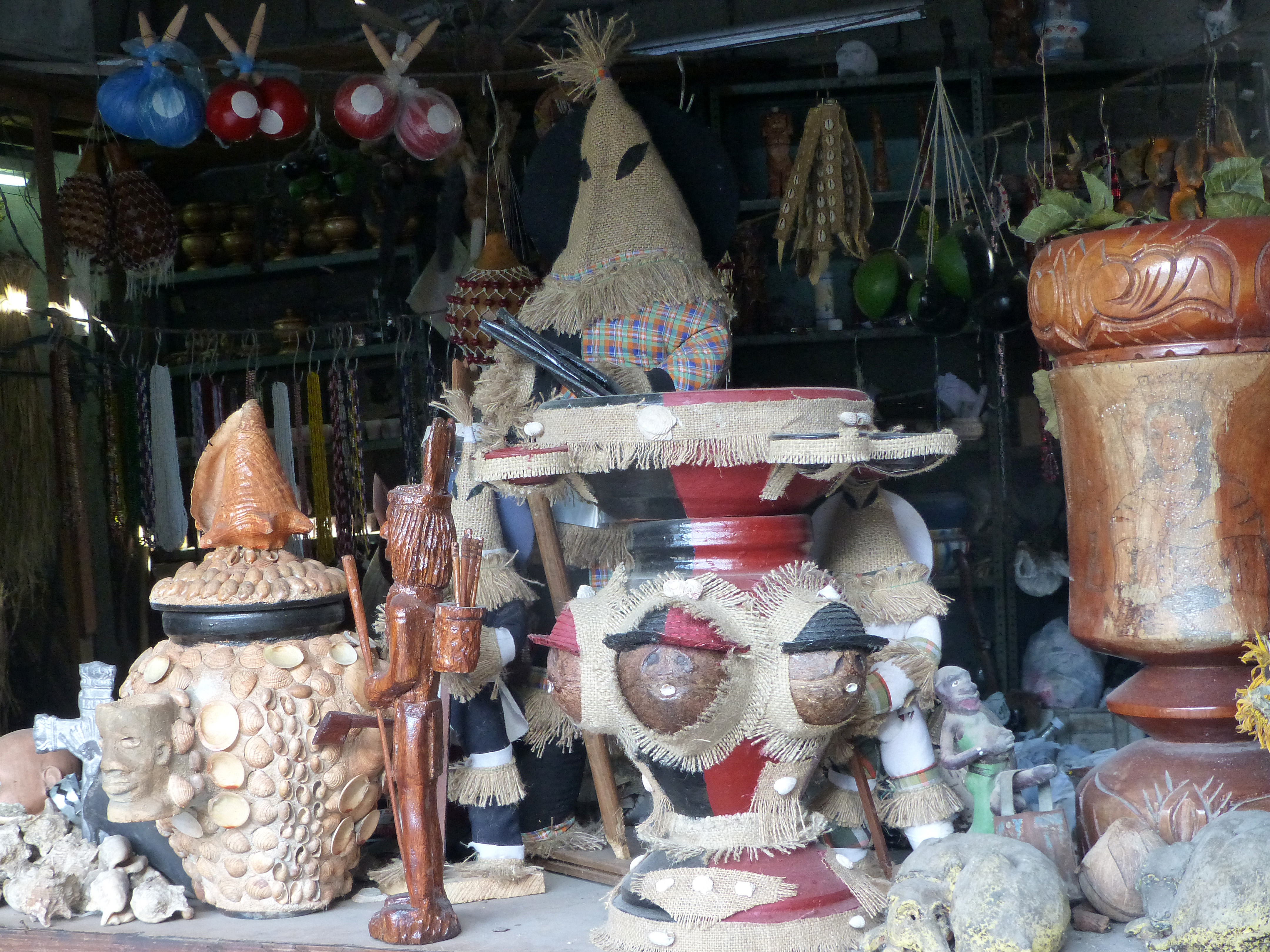 La Havane : vente d'articles religieux (Santería)